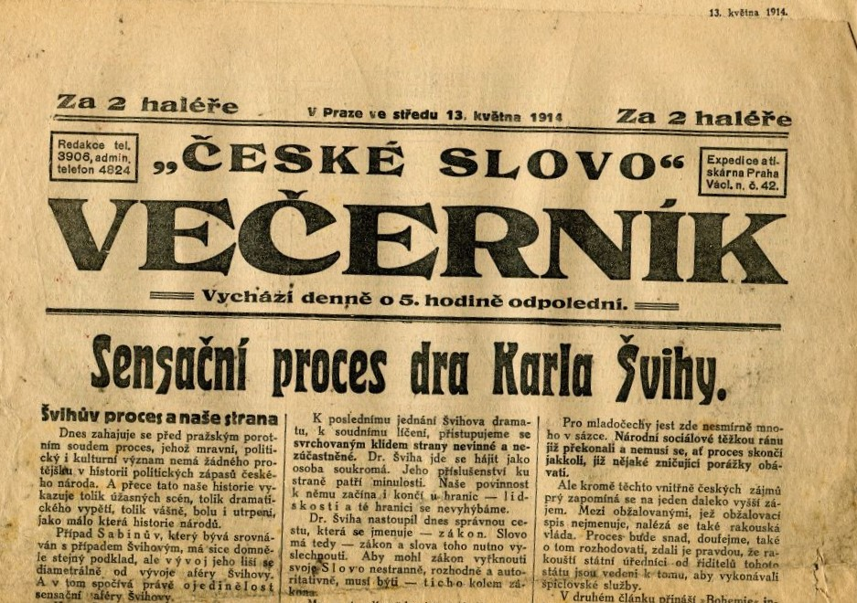 České Slovo Večerník 13.5.1914 - Švihova aféra v dobovém tisku